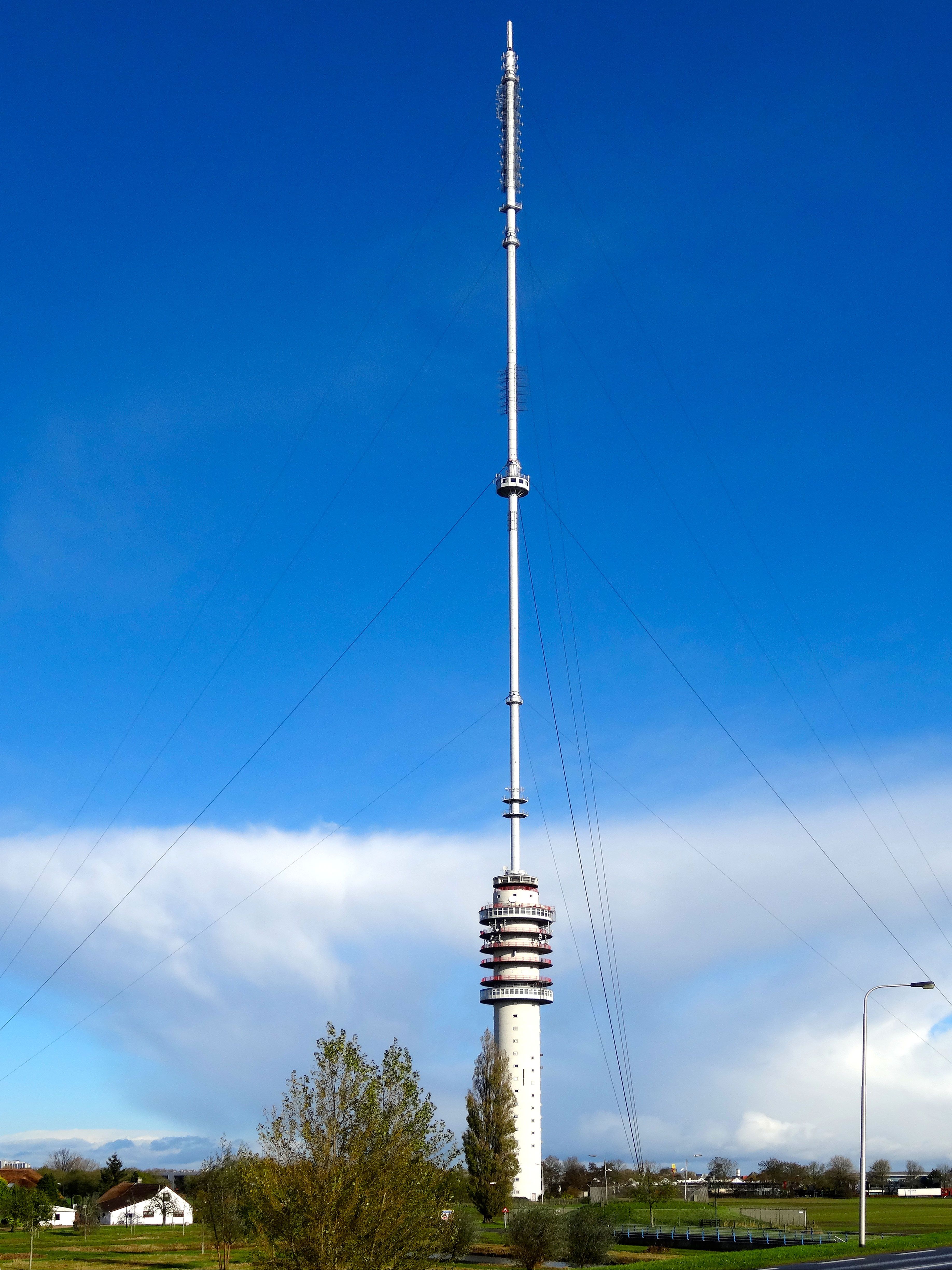 Gerbrandytoren - "Zendmast Lopik" - (FM-radio en televisie) te IJsselstein